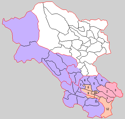 宮城県遠田郡の町村。